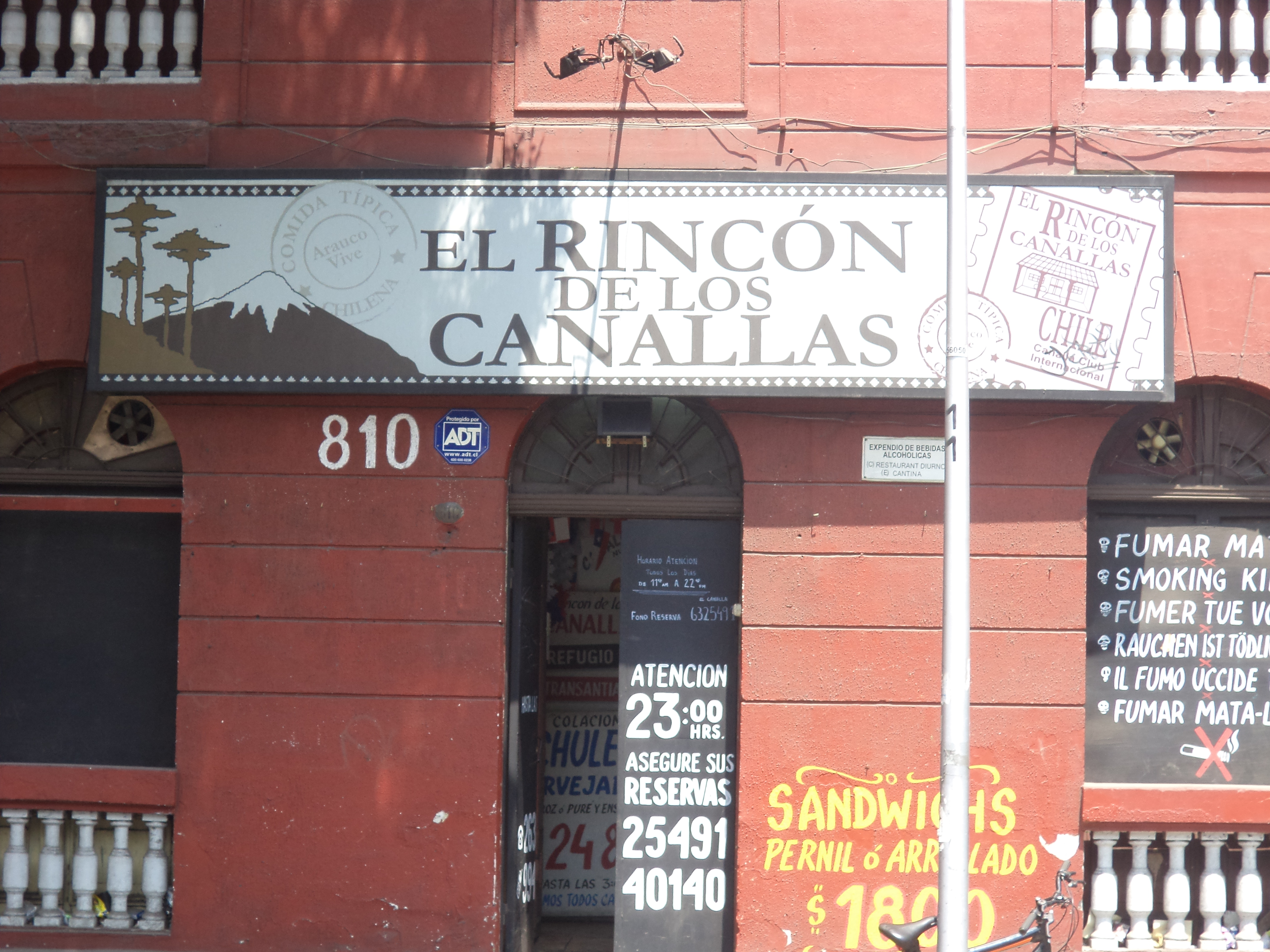 Tradicionas restaurante chileno fundado en 1980 como un clandestino de opositores al régimen militar.